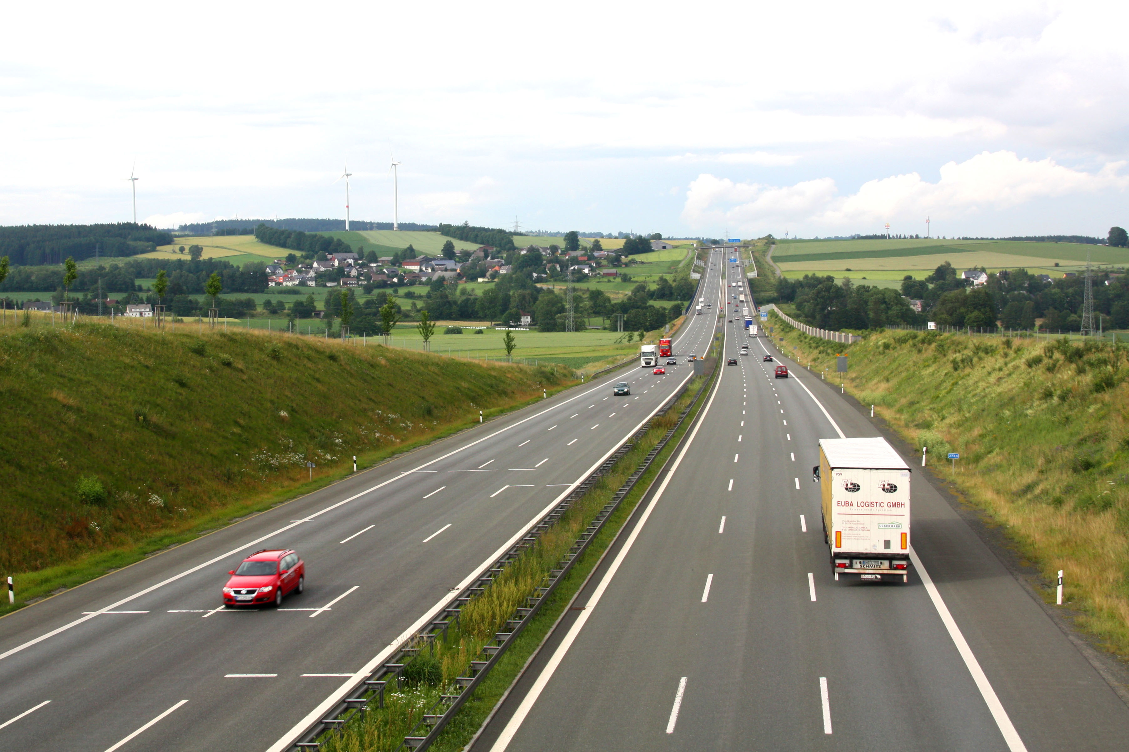 Sicht auf die Münchberger Senke aus Richtung Straas. In der Mitte der Senke die Talbrücke gut zu erkennen. Ausläufer der Stadt Münchberg auf der rechten Seite erkennbar. Links die Ortschaft Gottersdorf mit den Windenergieanlagen.